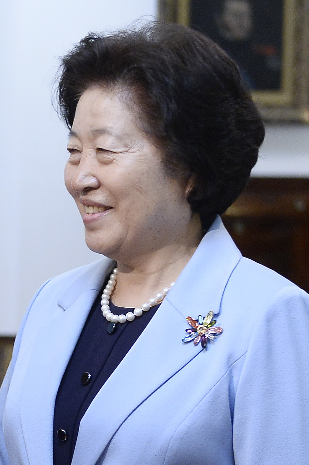 Gobierno de Chile